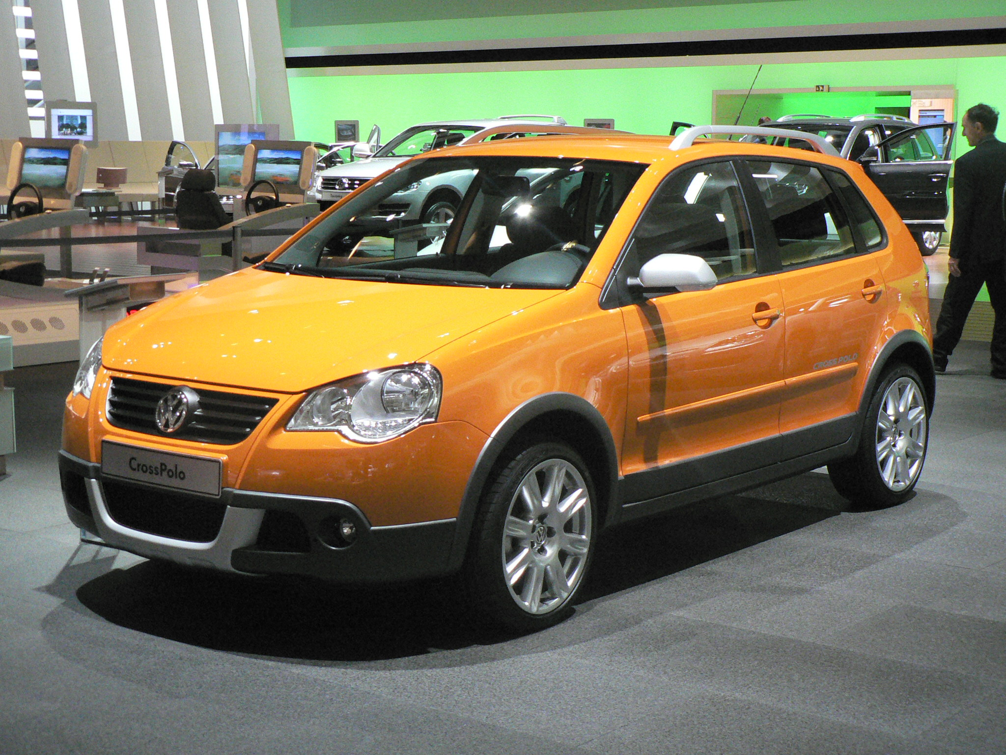 Mondial de l'automobile, Paris 2006